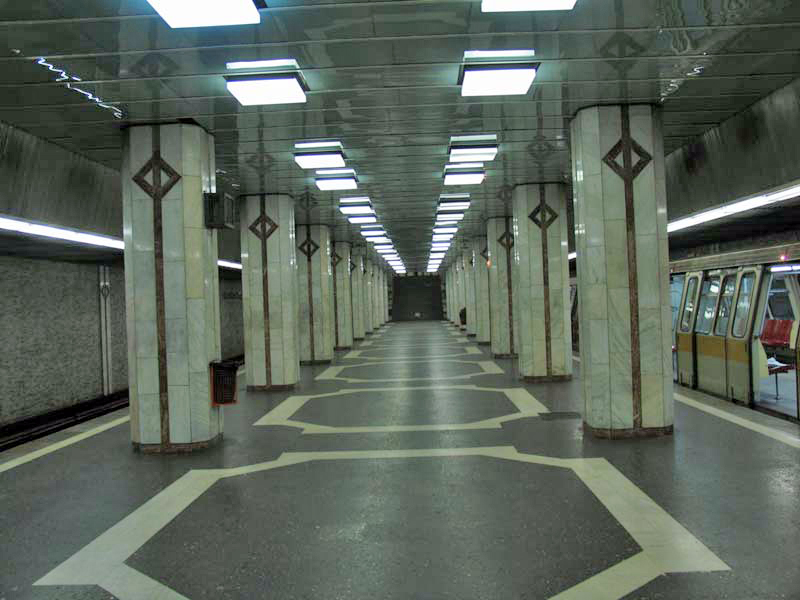 Le quai de la station Preciziei de la ligne M3 du métro de Bucarest.